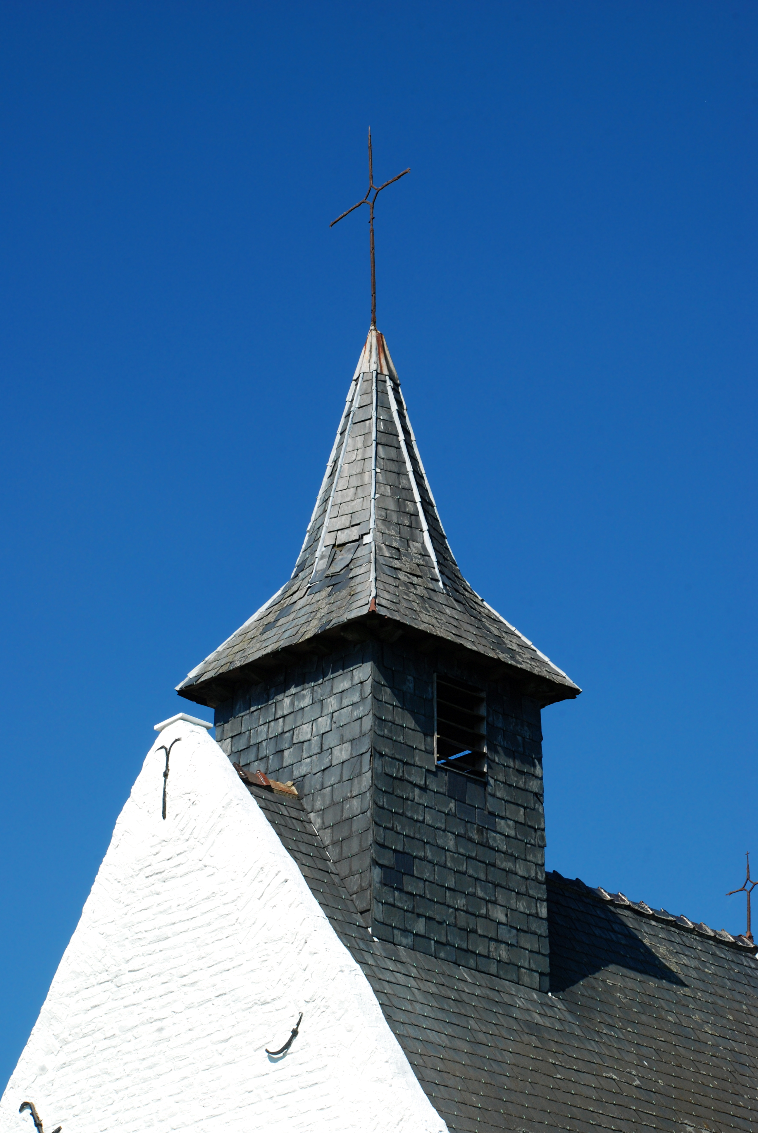 Belgique - Bousval - Chapelle du Try-au-Chêne